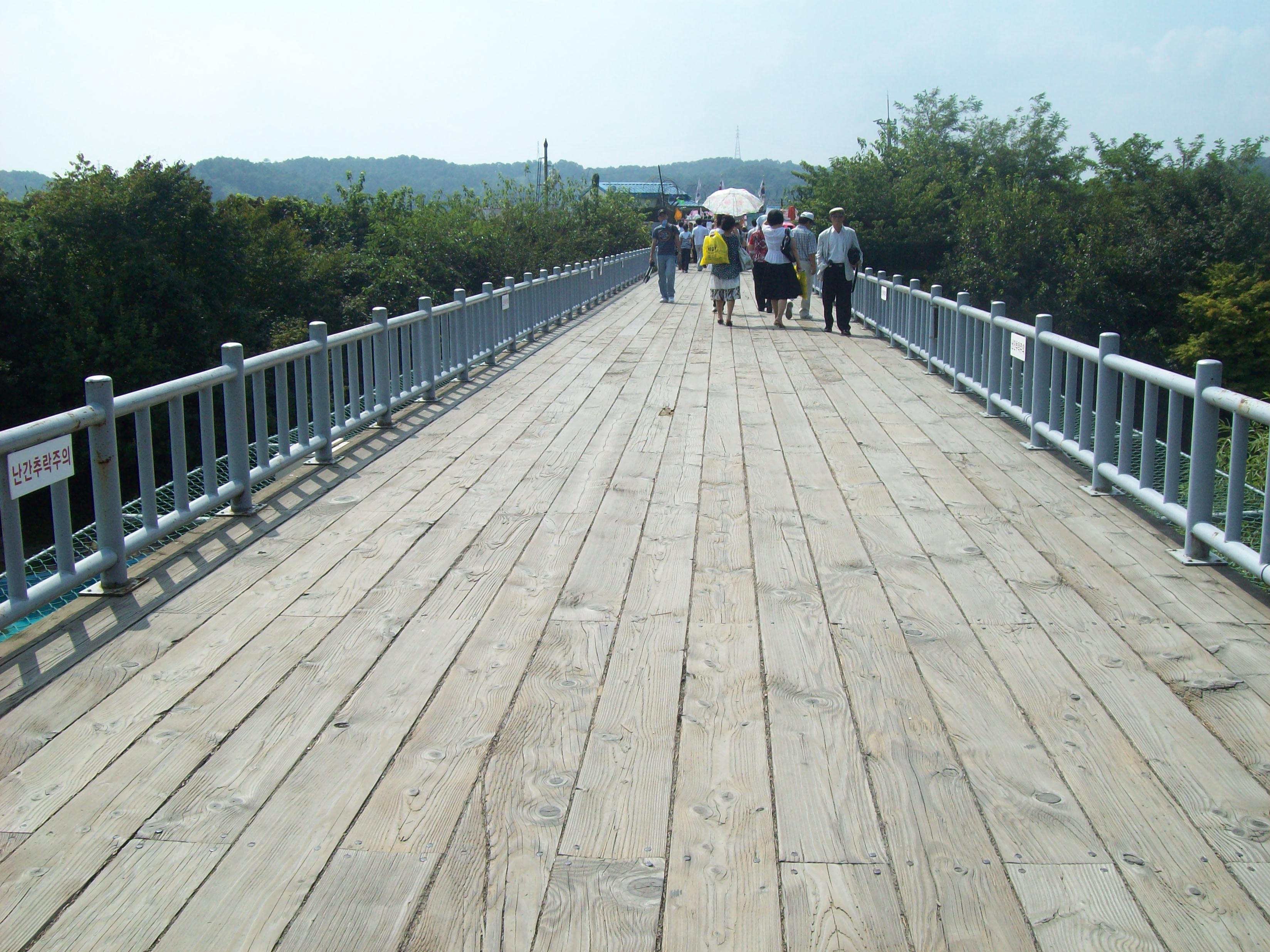 자유의 다리 모습